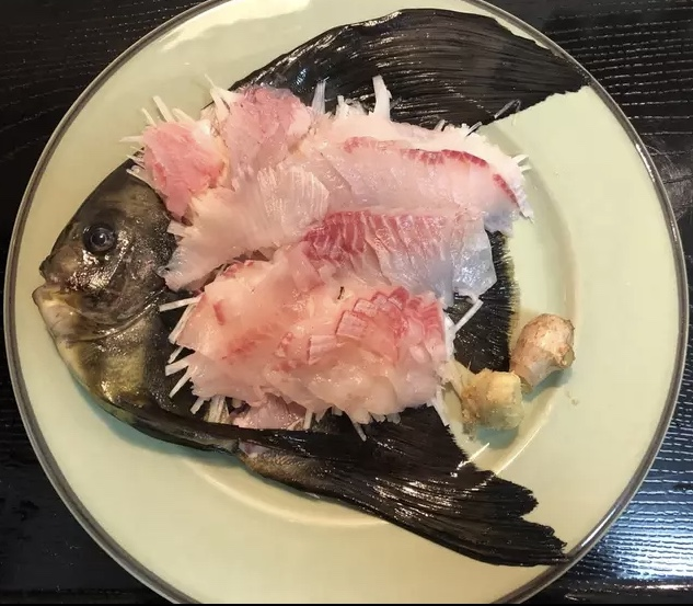 ツバメウオの食味はイシダイに似てとても旨みがある